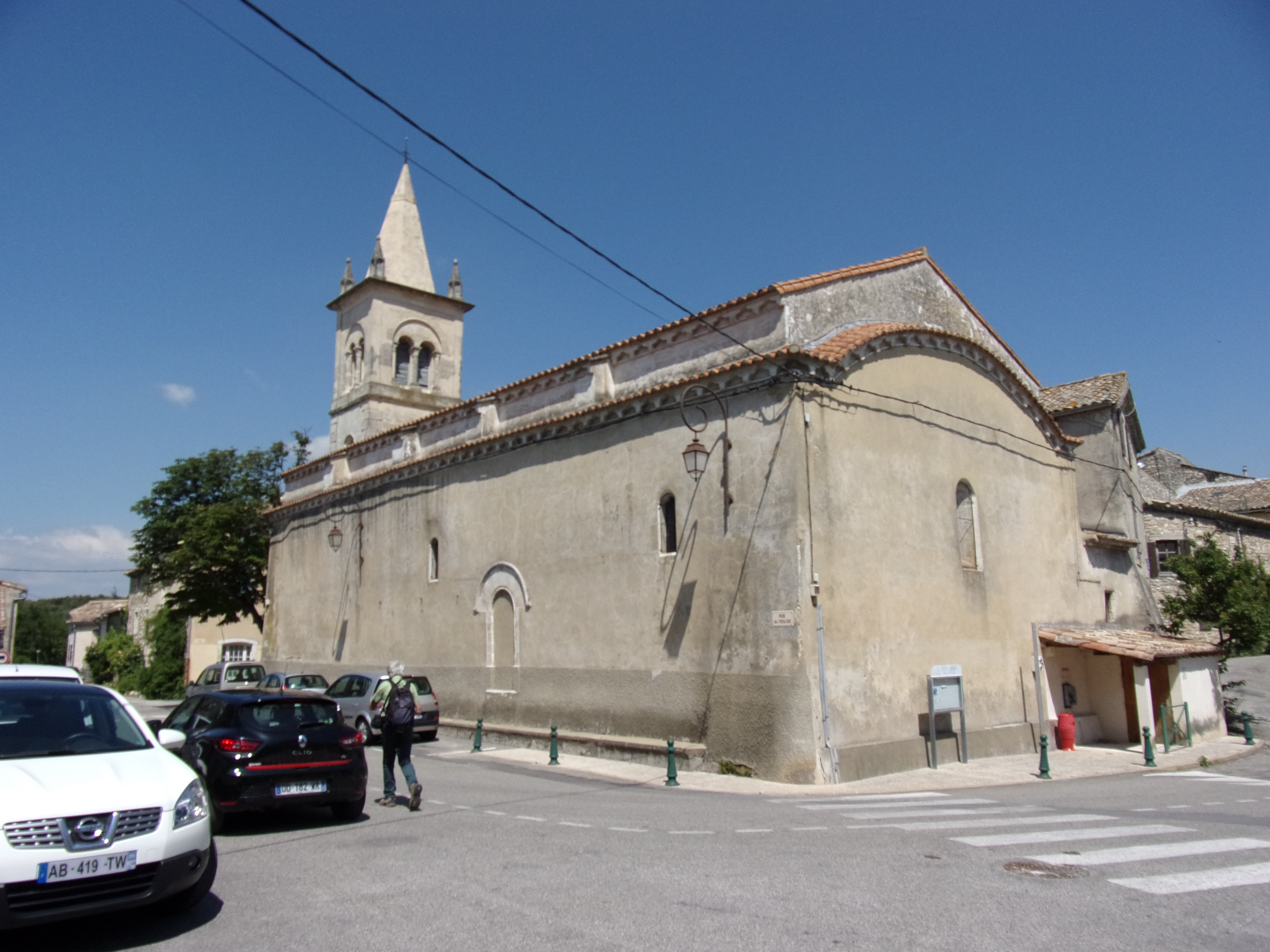 abside de l'église de Réauville